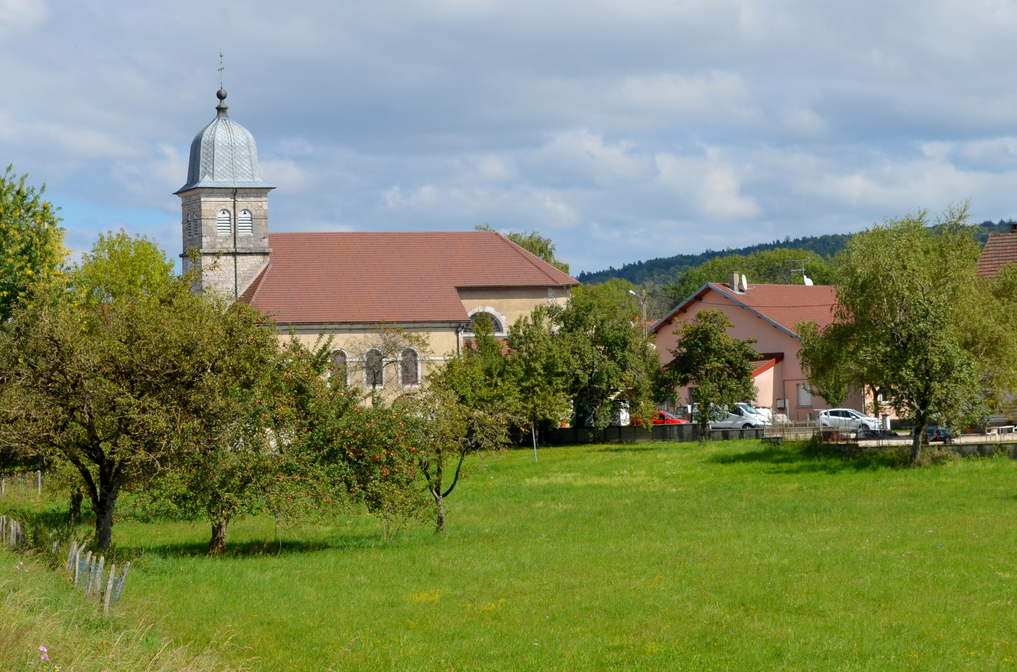 Meussia, Ain, France.